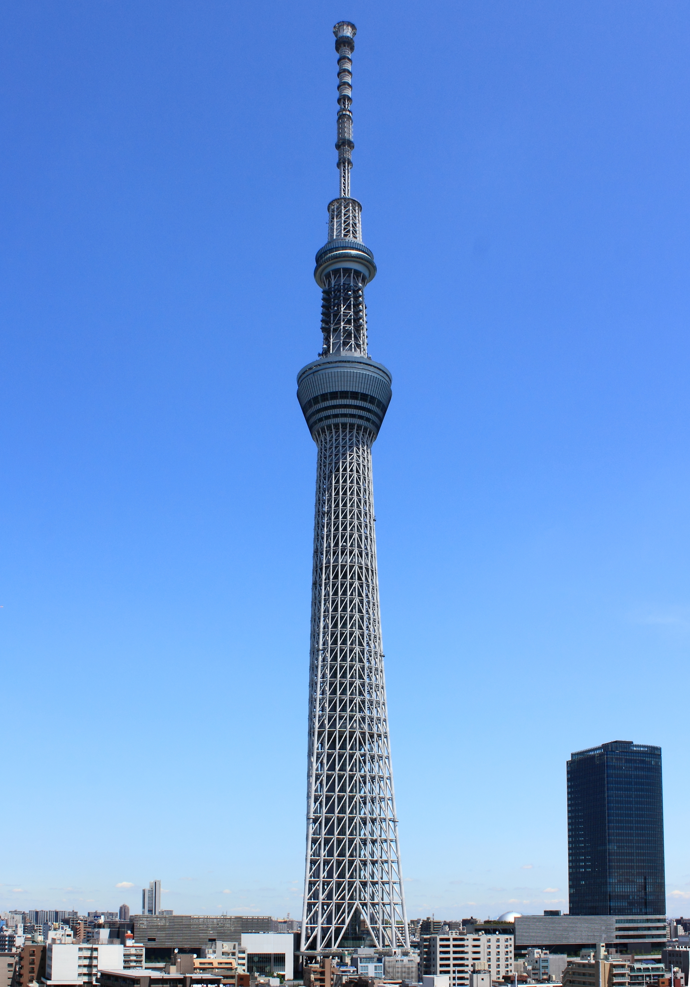 東京スカイツリー（東京都墨田区）。南から。